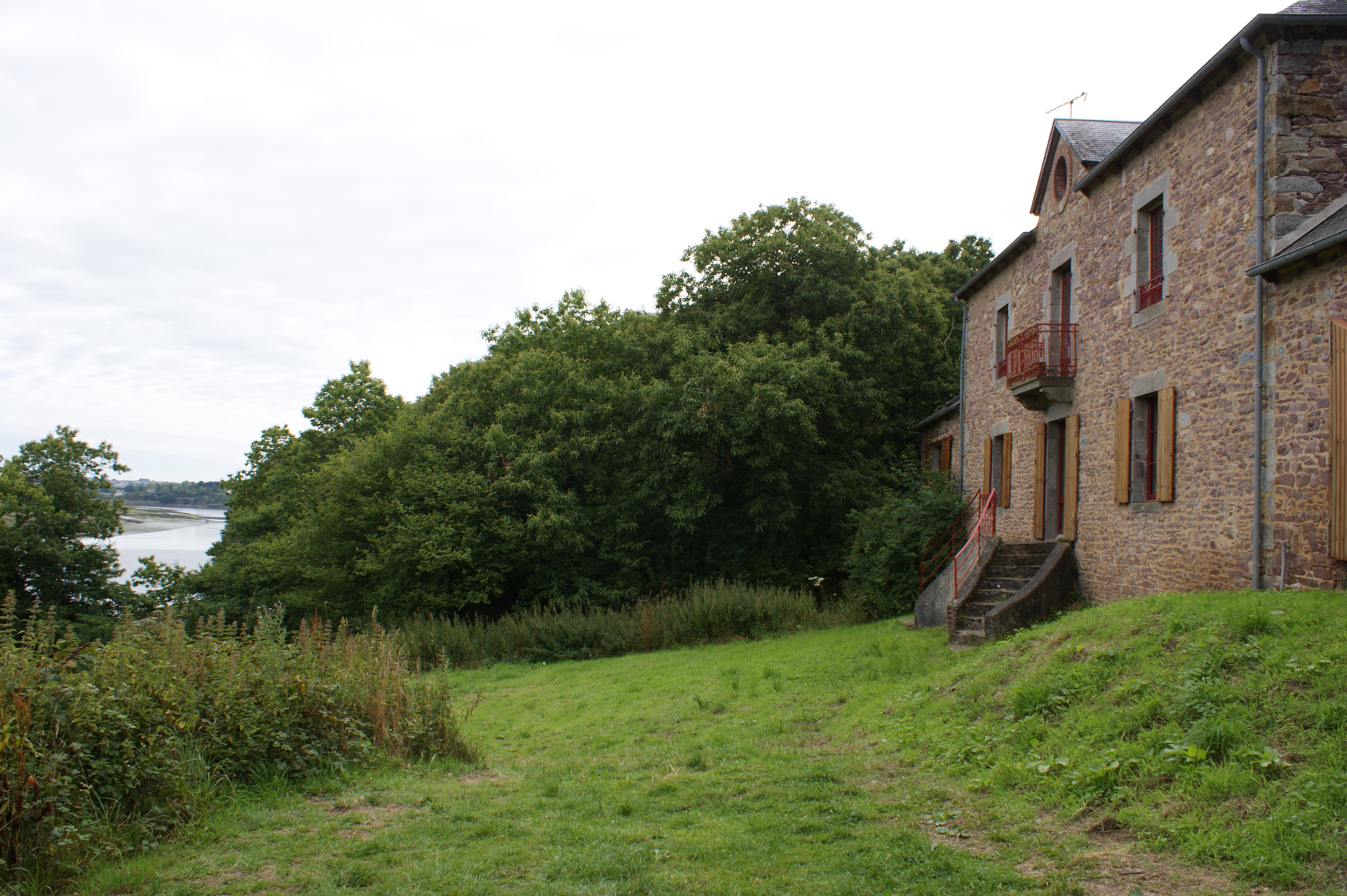 La façade sur le Trieux du manoir de Traou-Nez à Plourino. Situé à côté de la halte de Traou-Nez.